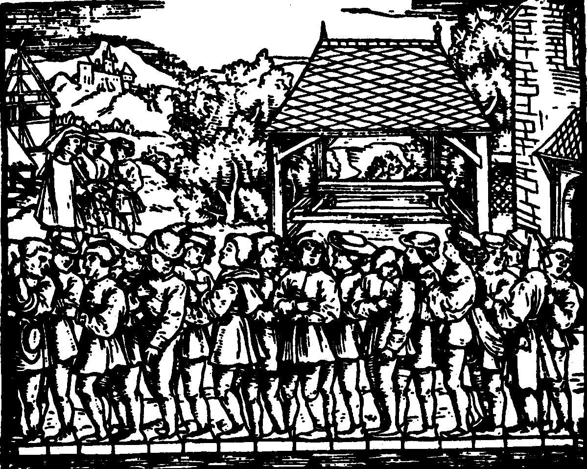 Determination of the mean length of a foot in a German town during the XVth or XVIth century, after a woodcut which was published in the book Geometrei by Jakob Koelbel (Frankfurt, ca. 1575). Détermination de la longueur moyenne d'un pied dans une ville d'Allemagne au cours du XVe ou XVIe siècle, d'après une xyllographie parue dans le livre Geometrei de Jakob Koelbel (Francfort, v. 1575). Mittlere Fußlängebestimmung in einer deutschen Stadt im 15. oder 16. Jahrhundert, nach einem Holzschnitt, welcher in dem Buch Geometrei von Jakob Koelbel (Frankfurt, um 1575) erschien. Cette figure est dans le domaine public, eu égard au fait que son auteur est mort depuis plusieurs siècles. Elle a été scannée à une résolution de 300ppi à partir d'un frontispice figurant dans le syllabus Statistische Methoden der Datenanalyse (Hochschulskript BI816/816a, Mannheim 1968). L'auteur de ce syllabus, le professeur Siegmund Brandt, a eu la gentillesse de me confirmer que cette figure se trouve bien dans le domaine public et qu'elle peut être utilisée librement à toutes fins utiles. Je lui suis aussi reconnaissant d'avoir bien voulu m'indiquer son origine. Carlo denis 12 juillet 2006 à 21:02 (CEST)